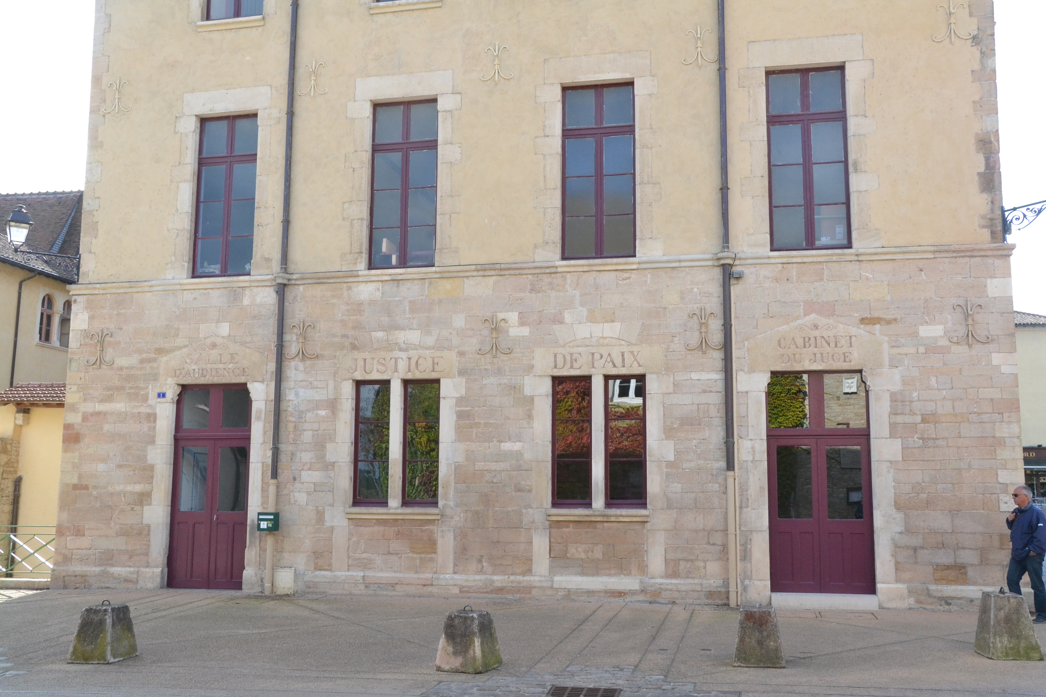 Ancienne justice de paix de Cluny (Saône-et-Loire, France).